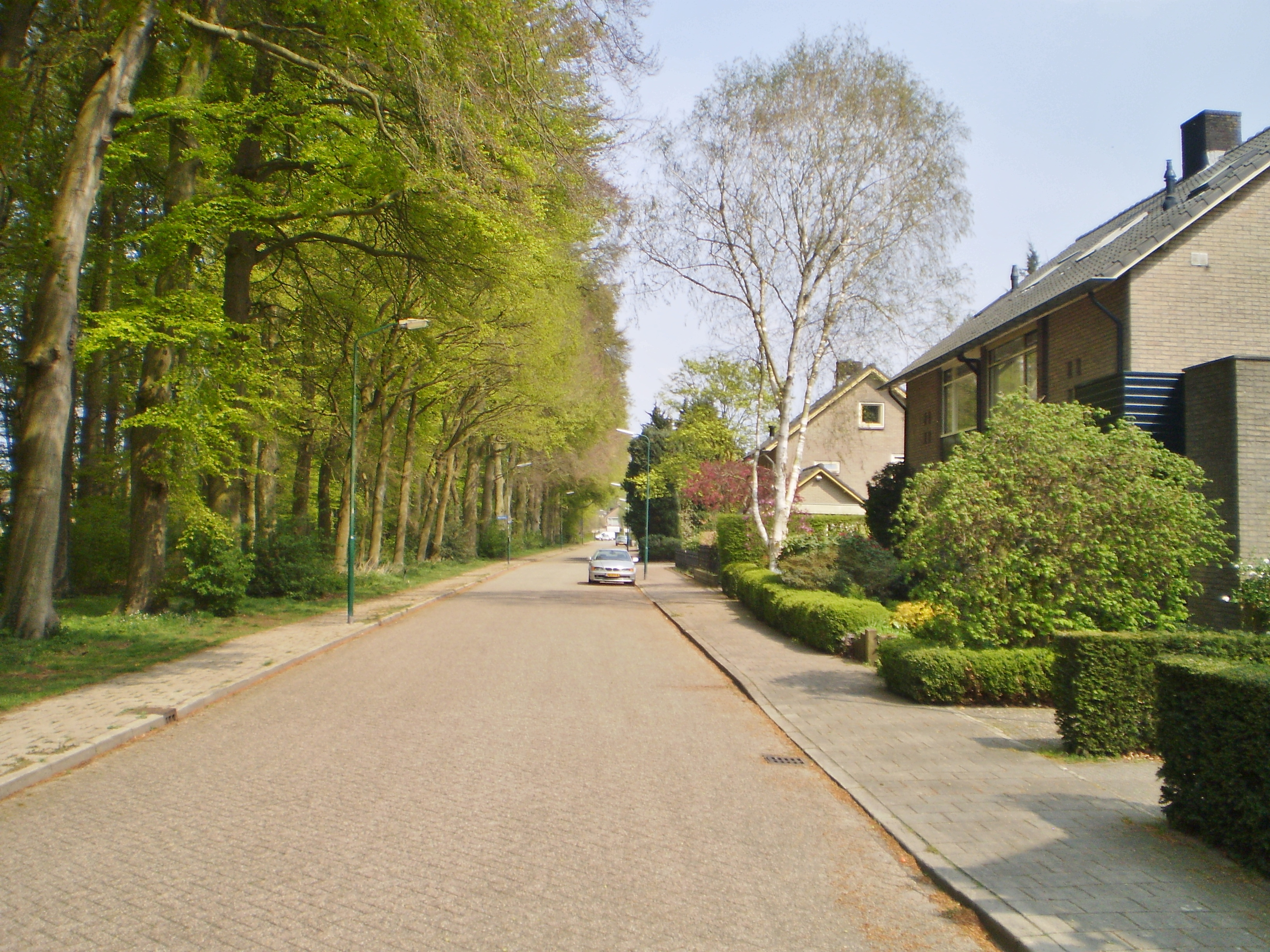 links het 'hoge bomen bos'